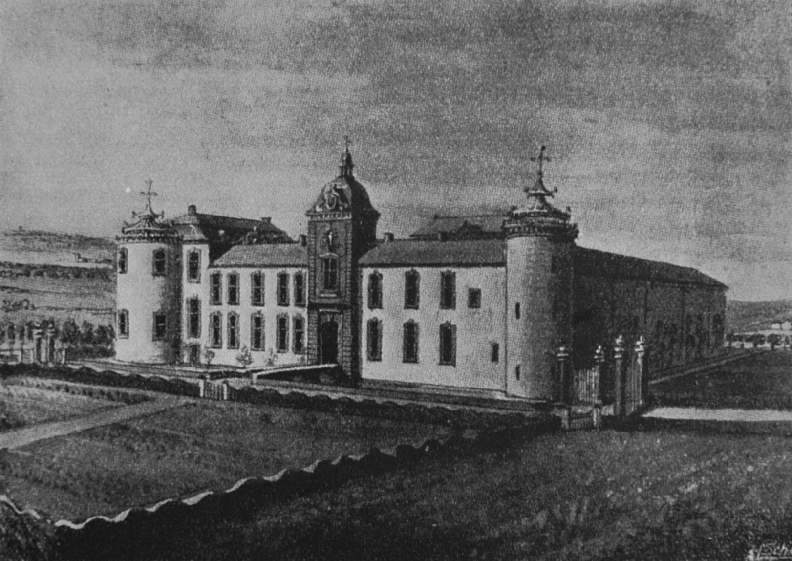 Gut Kalkofen in Aachen, Südansicht